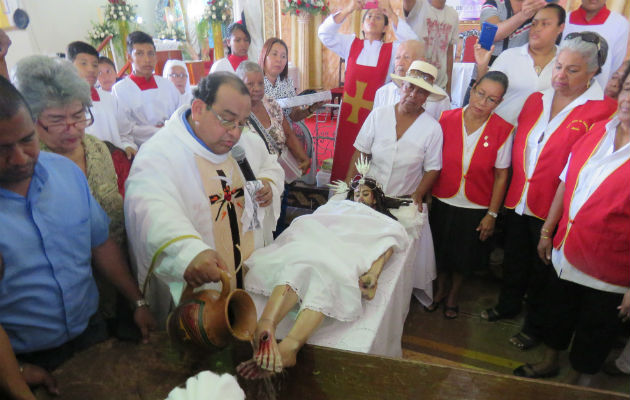 Lavatorio del Cristo de Esquipulas